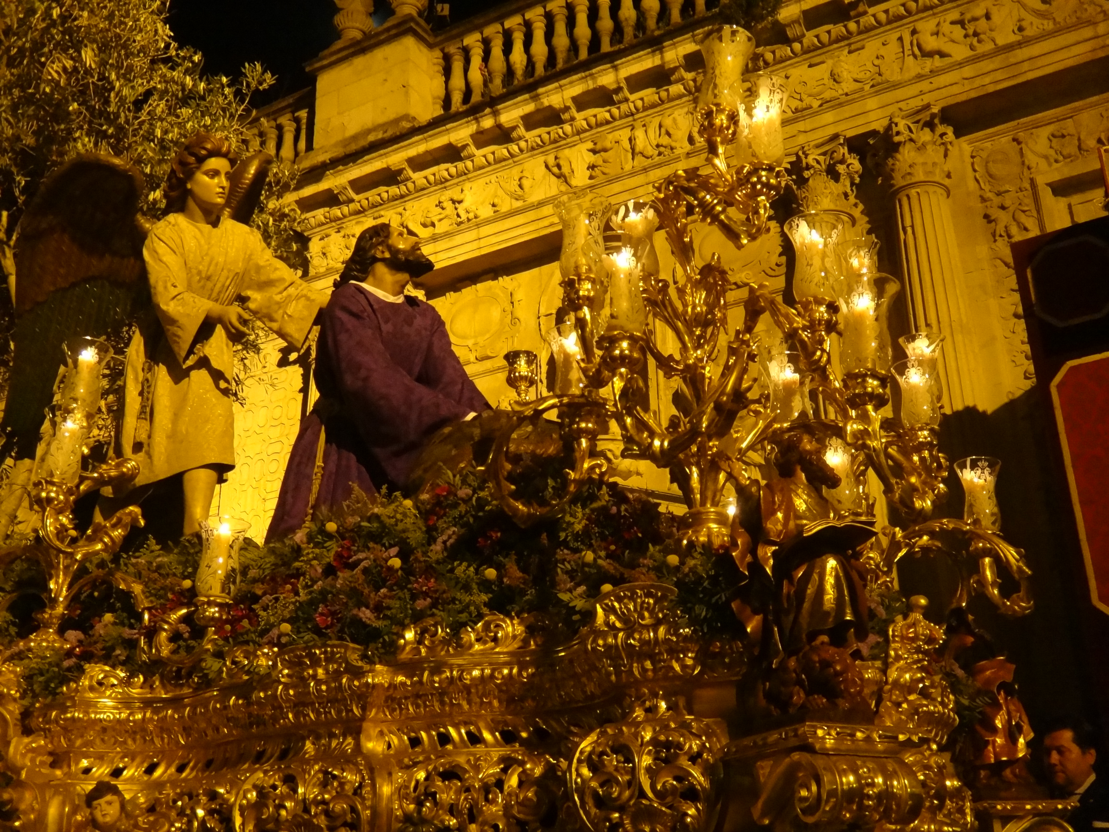 La Oración en el Huerto. Semana Santa de Jerez de la Frontera 2015 (Andalucía, España)